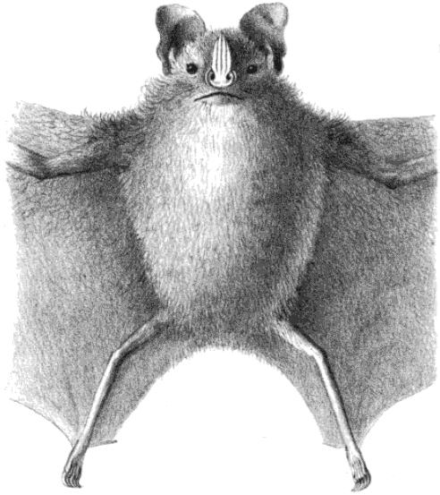 Artibeus toltecus